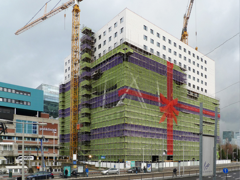 O2 VU, Amsterdam